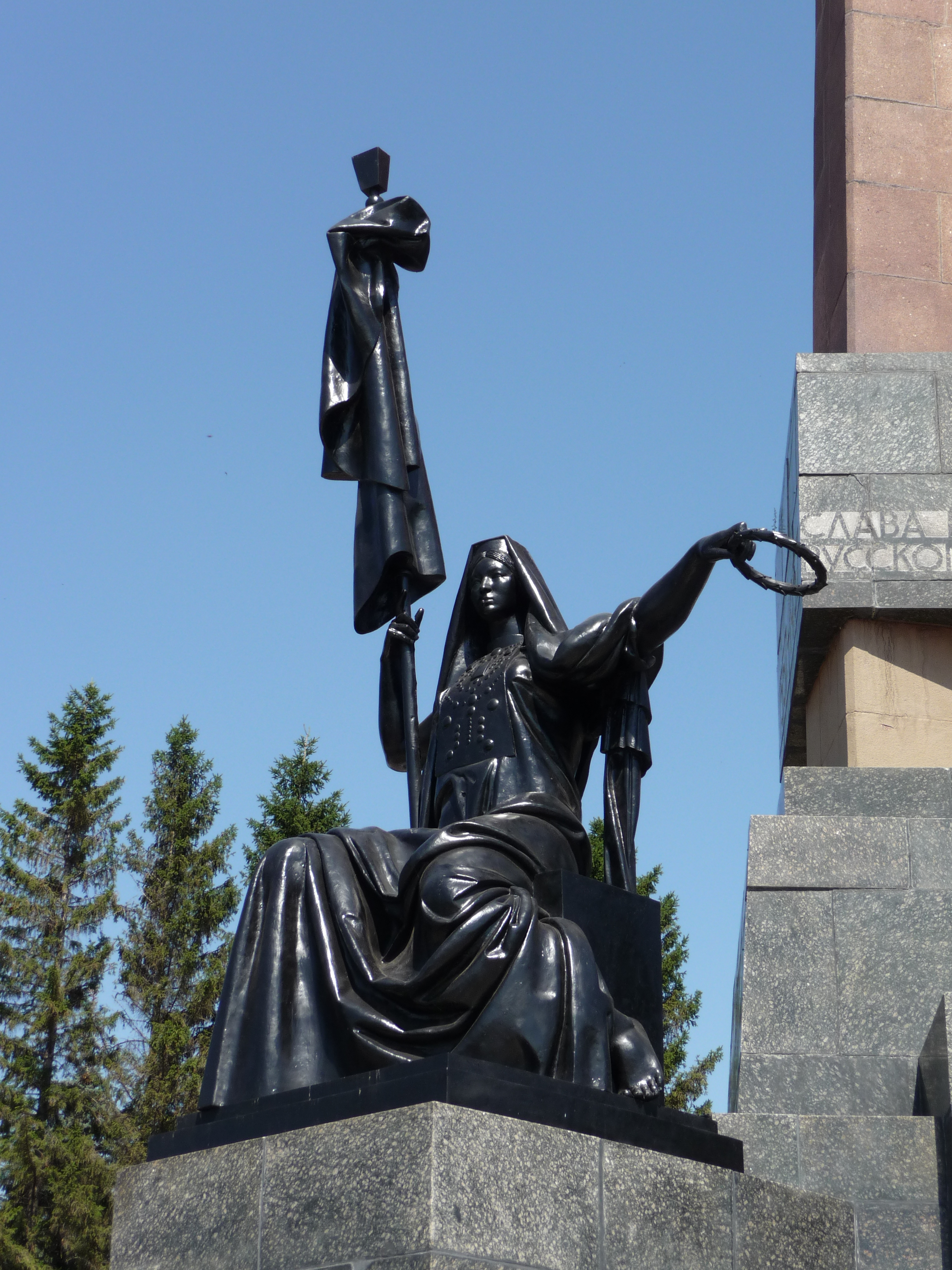 Монумент Дружба в честь 400-летия добровольного присоединения Башкирии к России: площадь Первомайская, Уфа, Башкортостан